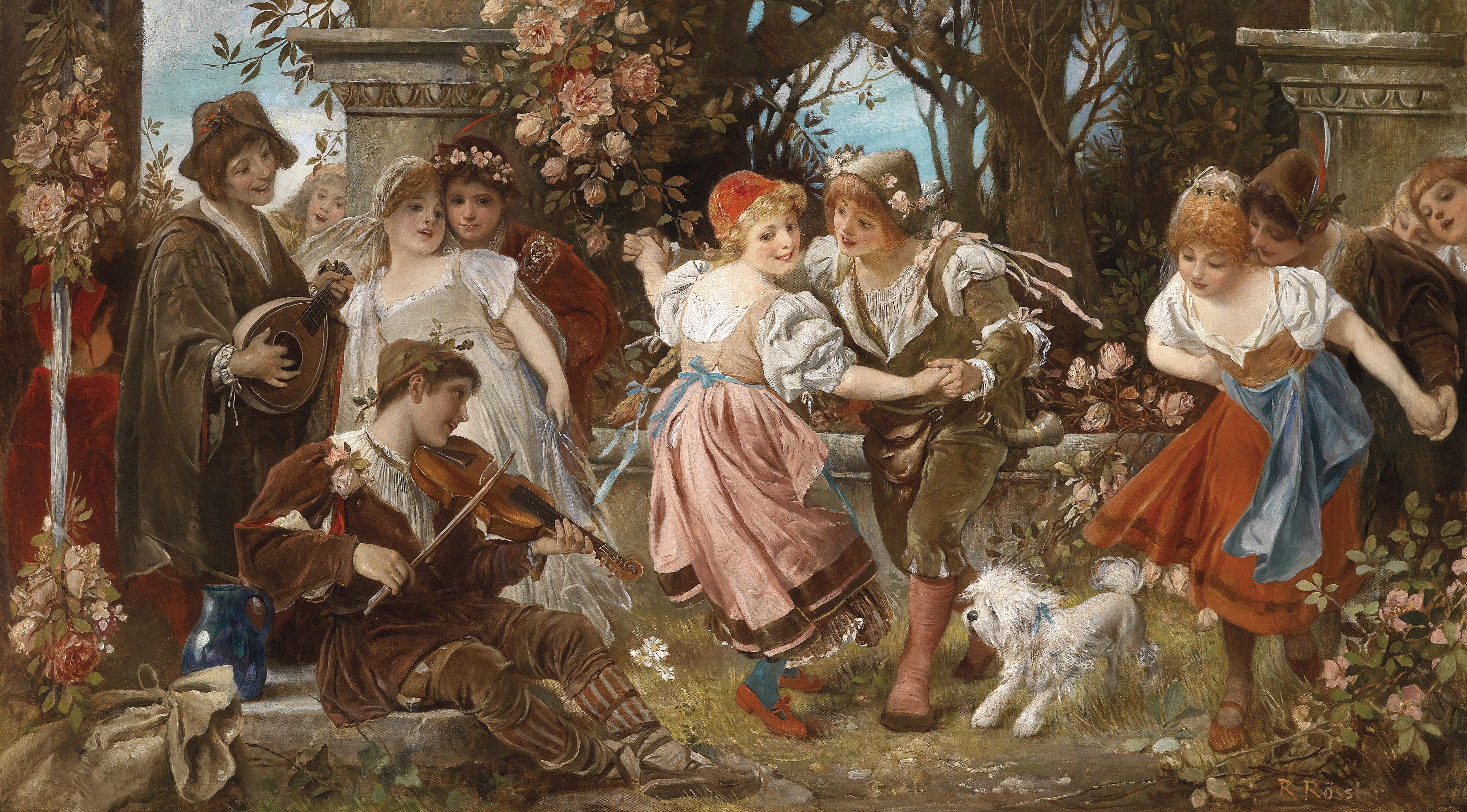 Musikanten und Tänzer in Parklandschaft